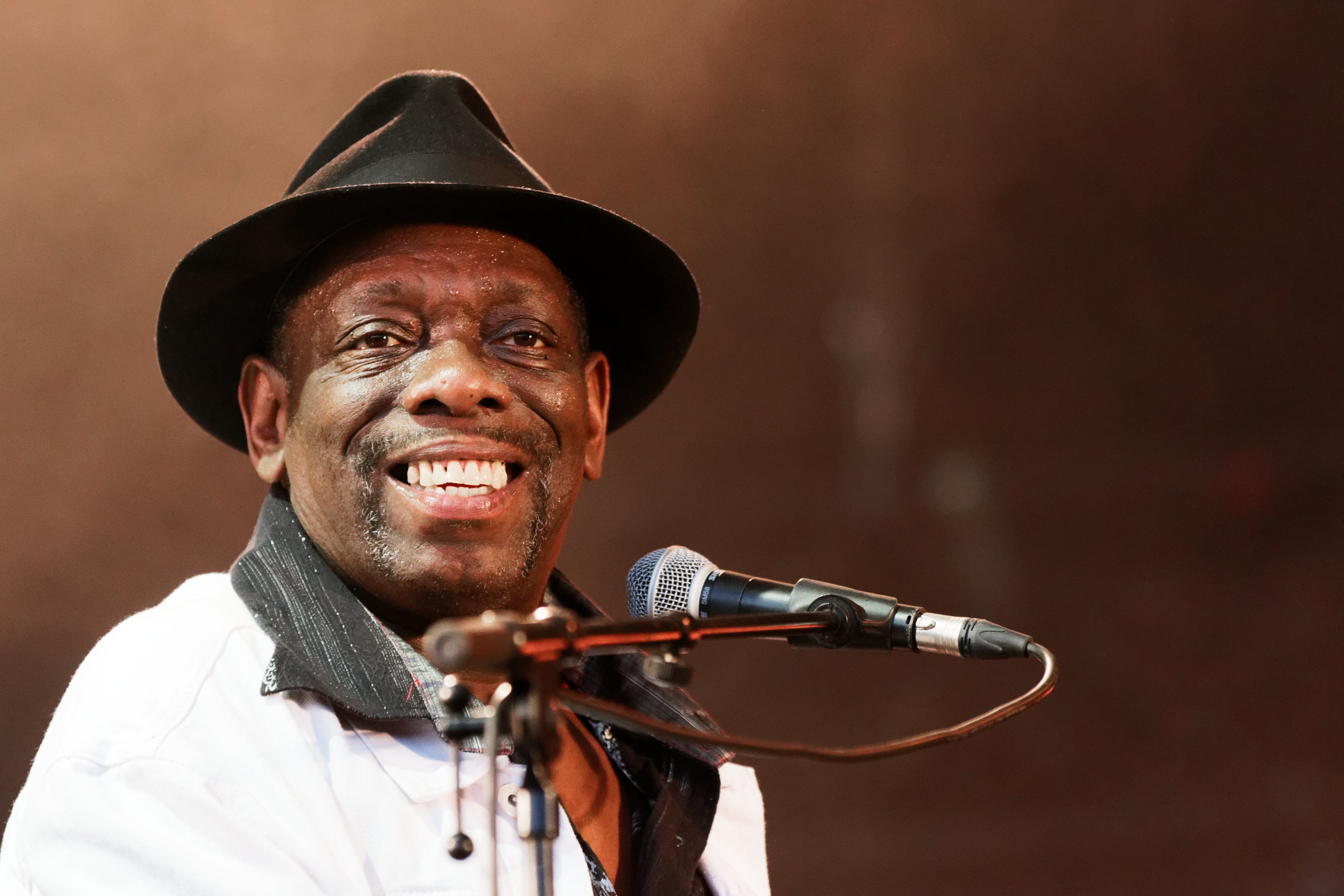 Lucky Peterson, accompagné du guitariste Shawn Kellerman, en concert sur la scène Landaoudec lors du festival du Bout du Monde 2016 à Crozon dans le Finistère (France).